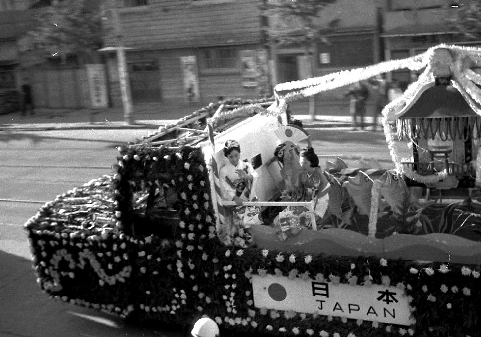 神戸市港祭り花電車（湊川公園前）日本